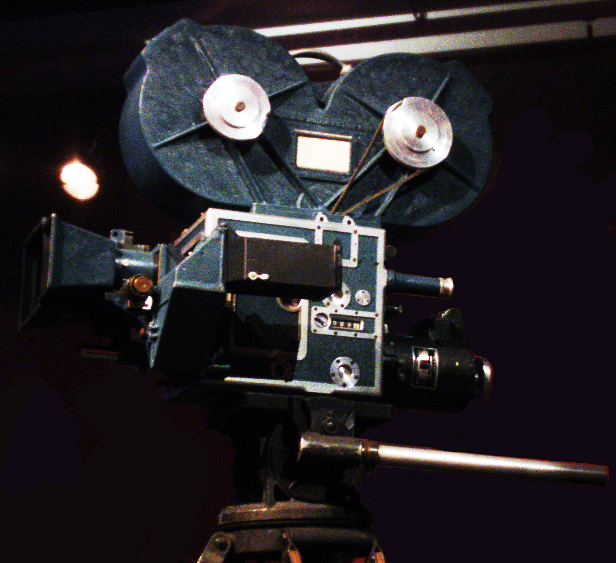 Caméra Technicolor (trichrome) années 1940-50